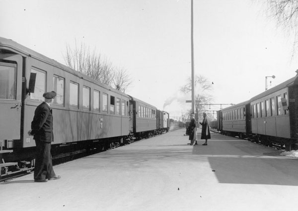 Två passagerartåg på Uppsala Östra.